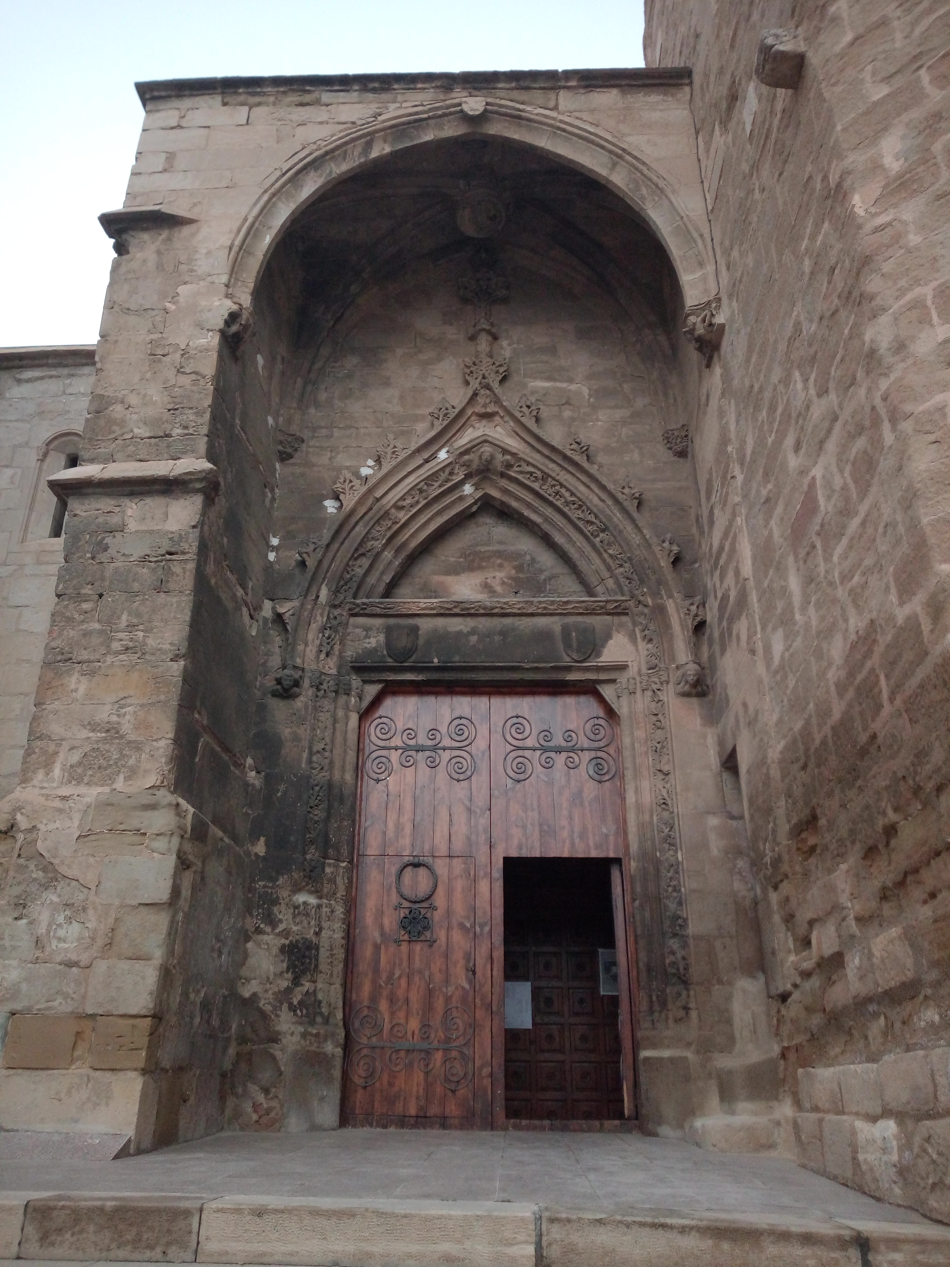 Accés a la parròquia, modificació del segle XV